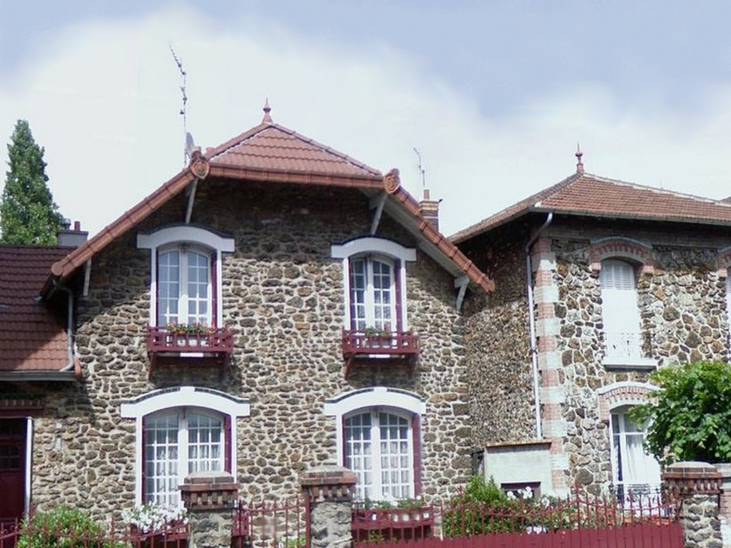 Maisons en meulière à Drancy